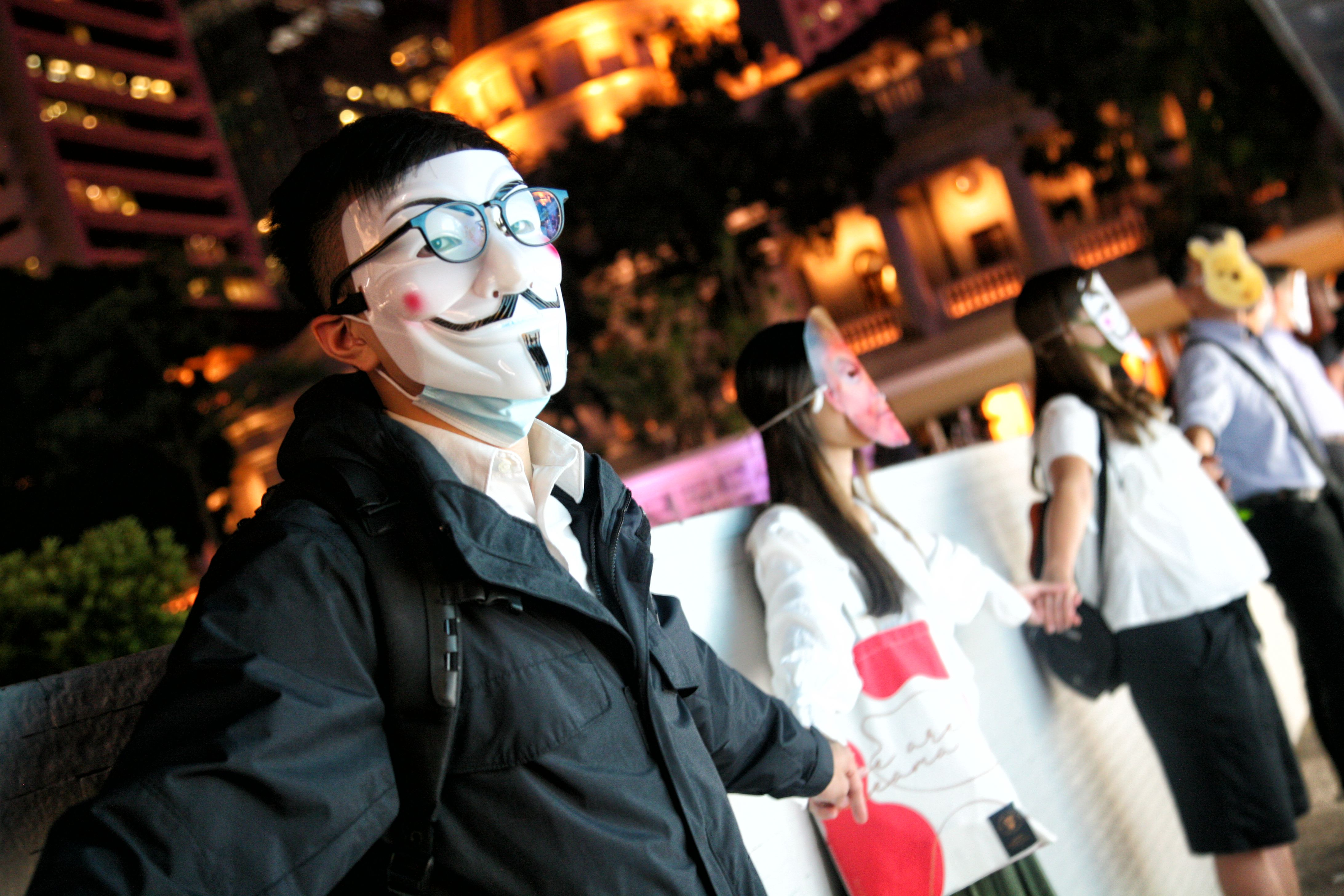 粵語: 有市民喺中環戴上面具築成人鏈。